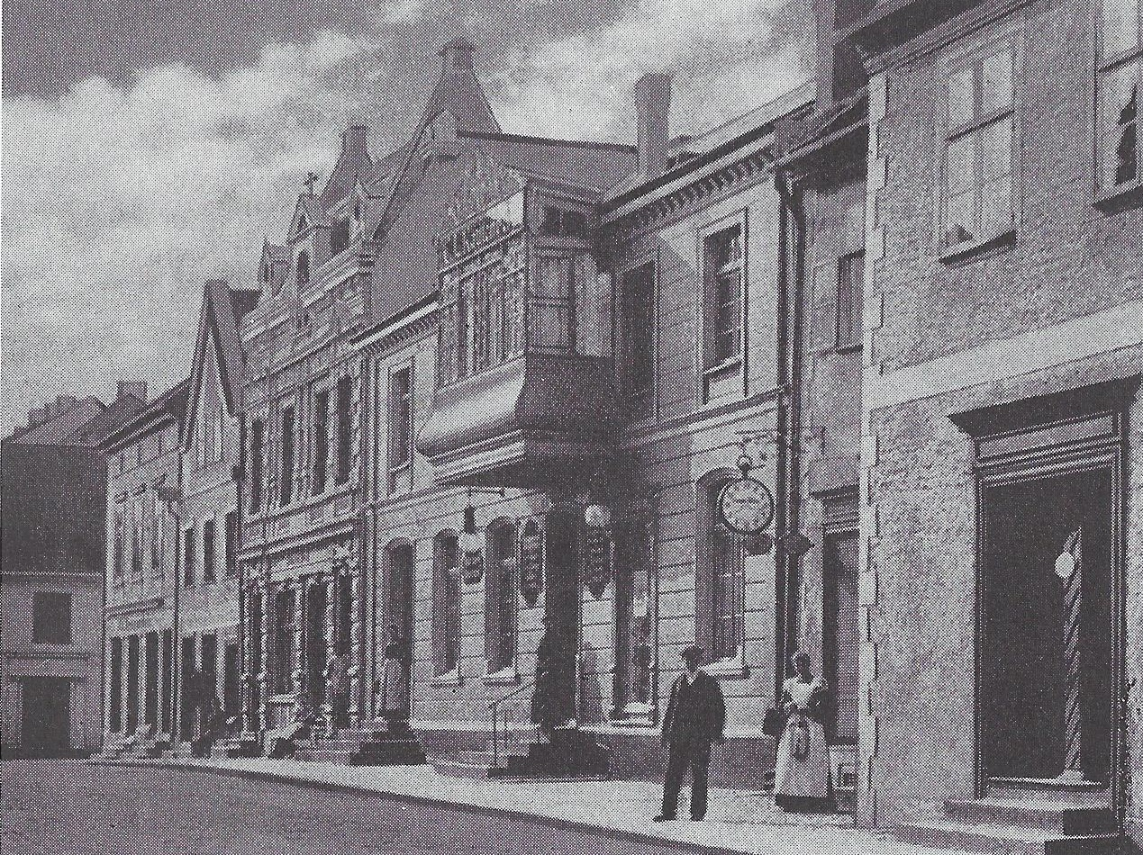 Breite Straße mit dem Verlagshaus C. L. Rautenberg in Mohrungen in Ostpreußen.